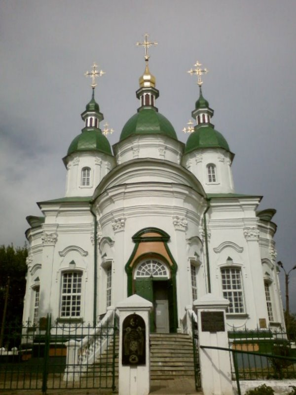 Собор Антонія і Феодосія у Василькові